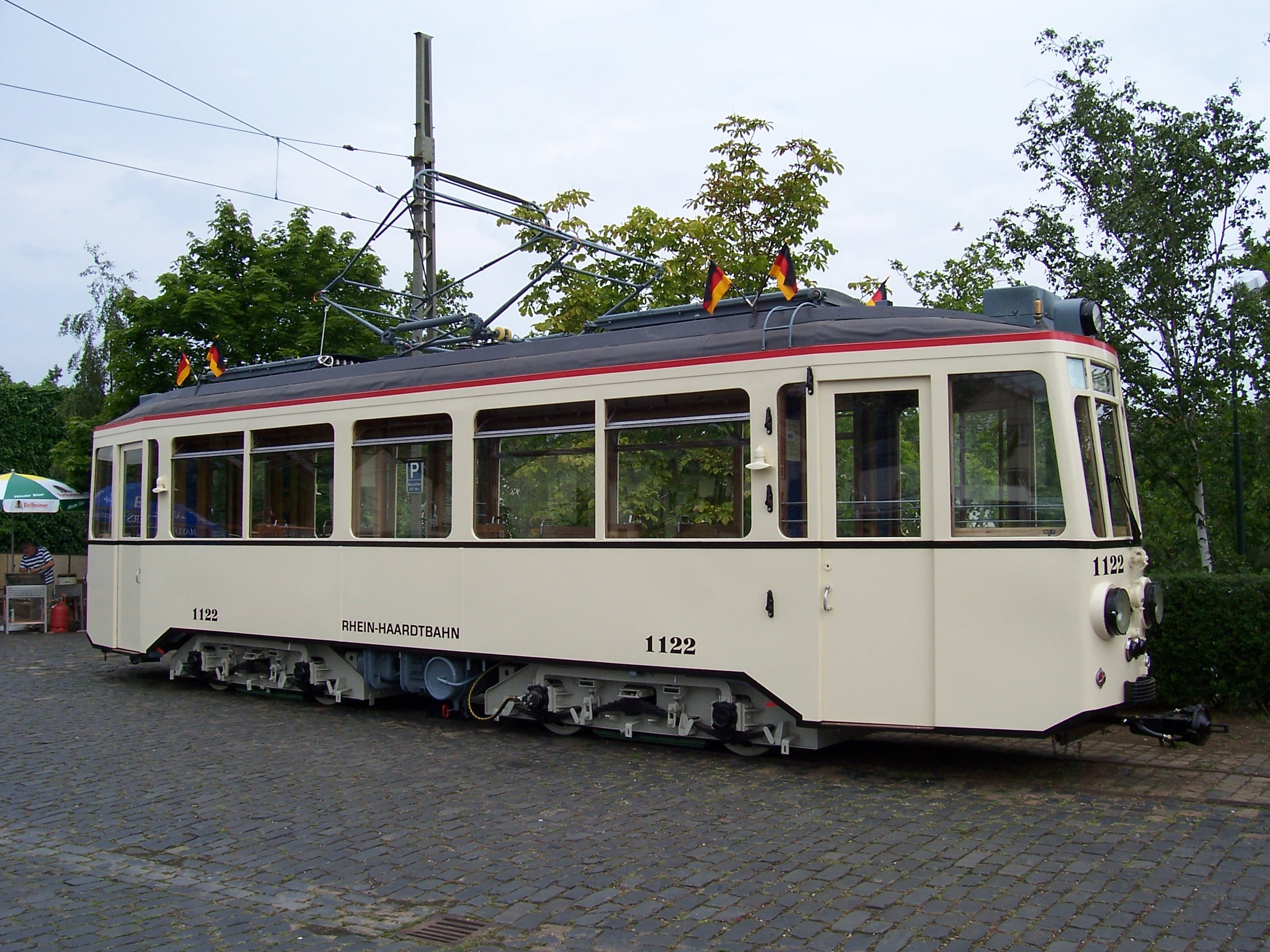 Triebwagen 1122 der Rhein-Haardtbahn in Bad-Dürkheim My own photo from 10-jul-2005